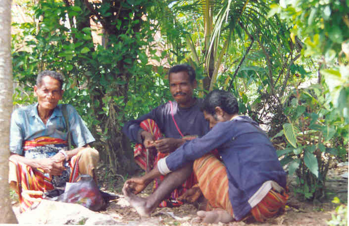 Atoin Meto beim Marktbesuch, Oinlasi, Amanuban Tengah